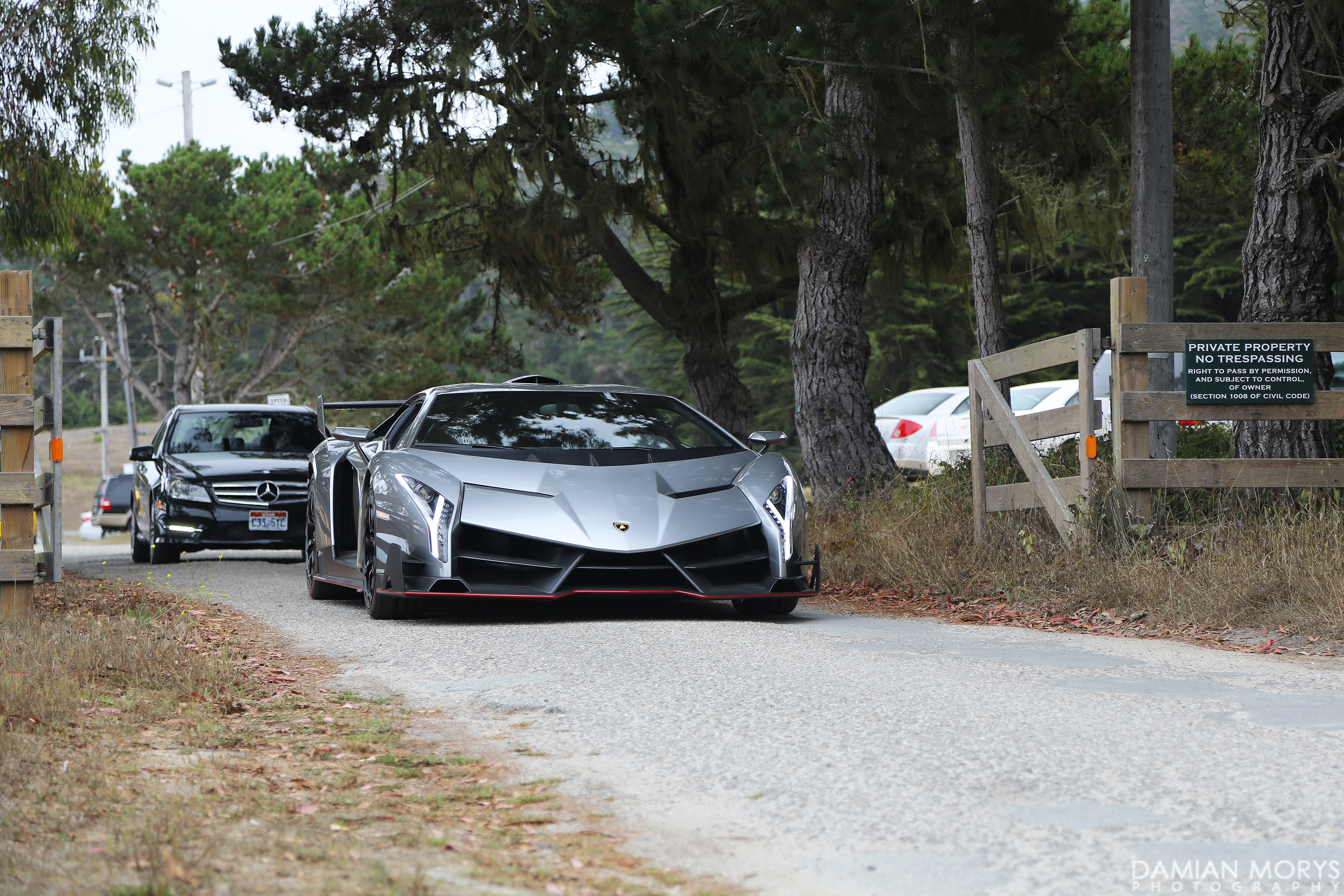 Veneno.